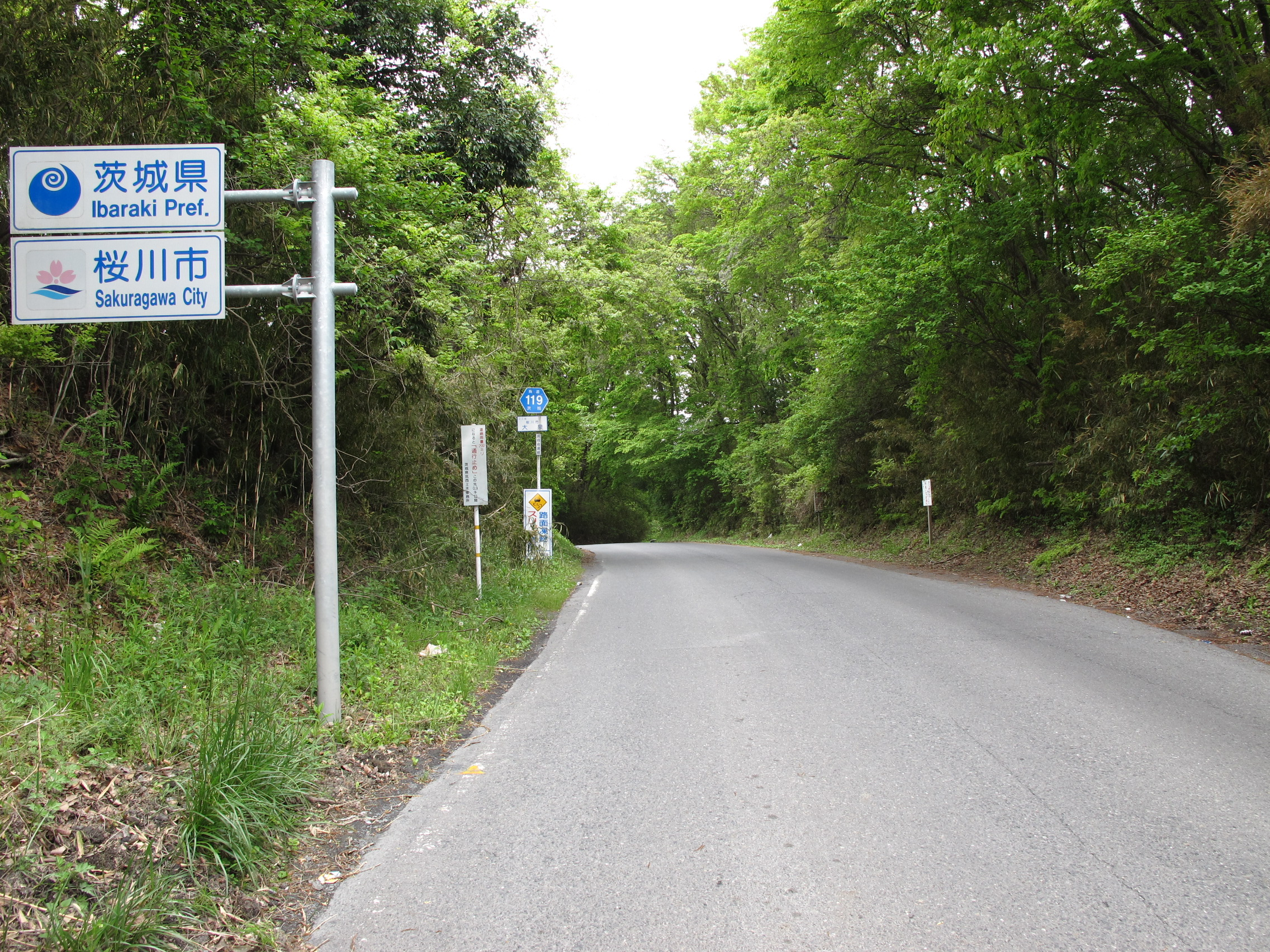 栃木・茨城県道119号真岡岩瀬線（県境付近 茨城県方向）